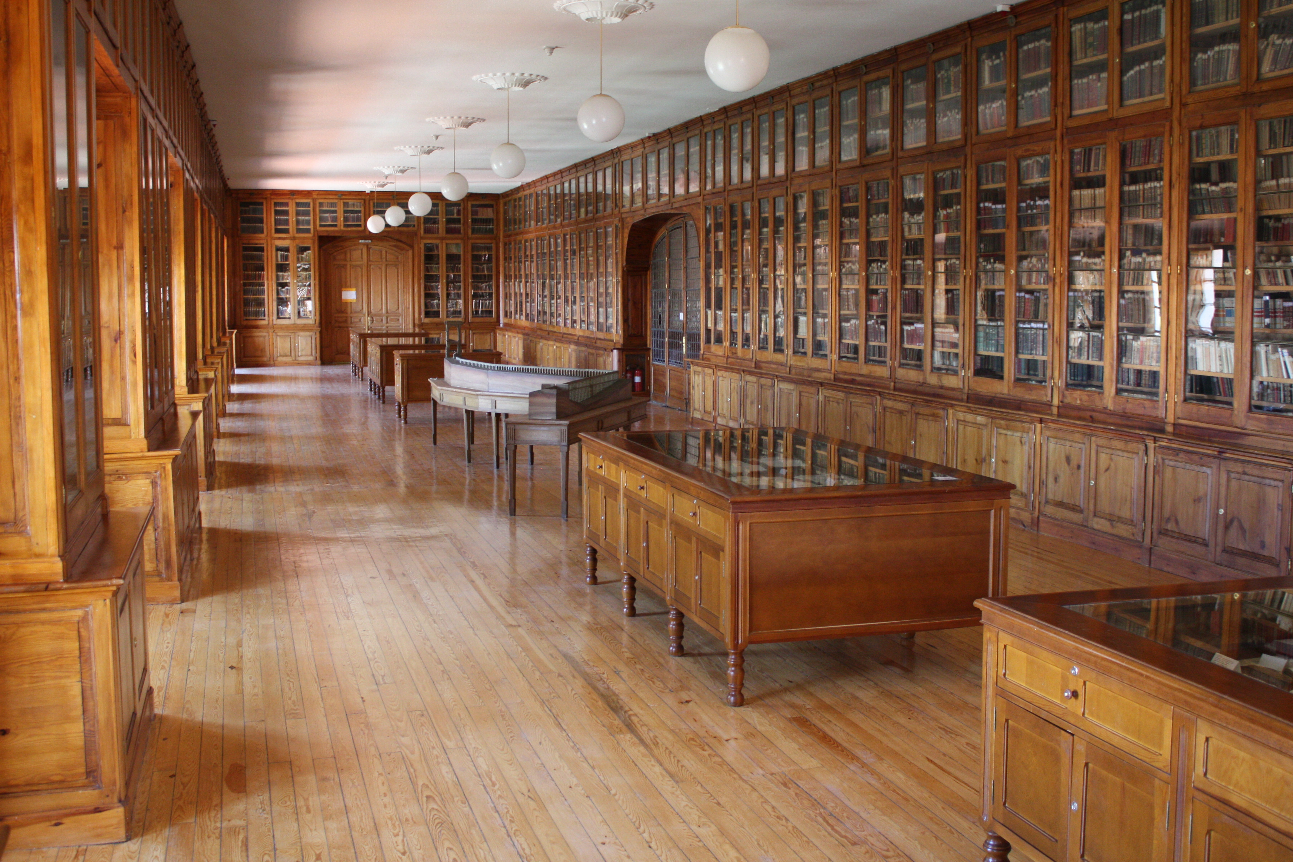 La Biblioteca de la Academia de Artilleria está situada en Segovia, España, en el Exconvento de San Francisco. Forma parte de la Academia de Artillería y es la heredera de la ubicada en el Alcázar de Segovia antes de su incendio.1 Tiene un número de volúmenes cercano a los 50000 ejemplares de obras científicas, en particular de matemáticas, geometría, física, astronomía, química, fortificaciones, navegación e historia natural. En ella se encuentra –solo teniendo en cuenta la parte científica y militar- toda la ciencia europea de los S. XVIII y XIX y toda la tratadística artillera y de fortificación de los cinco últimos siglos. Biblioteca de la Academia de Artillería Native nameBiblioteca de la Academia de Artillería de SegoviaParent institutionMinistry of DefenceLocationSegovia , (Spain)Coordinates40° 56′ 46.33″ N, 4° 07′ 03.01″ W Established1764Web page[1]Authority control : Q16487103 VIAF: 155948938 ISNI: 0000 0001 2191 4096 LCCN: n2003045487 SUDOC: 034685251 BNF: 131828274 WorldCat institution QS:P195,Q16487103 Segovia Artillery Academy Native nameAcademia de Artillería de SegoviaLocationSegovia , (Spain)Coordinates40° 56′ 46.55″ N, 4° 07′ 03.53″ W Established1764Web page control : Q5655771 VIAF: 136640115 ISNI: 0000 0001 2165 1820 LCCN: no92012670 GND: 5096023-4 SUDOC: 035350768 WorldCat institution QS:P195,Q5655771